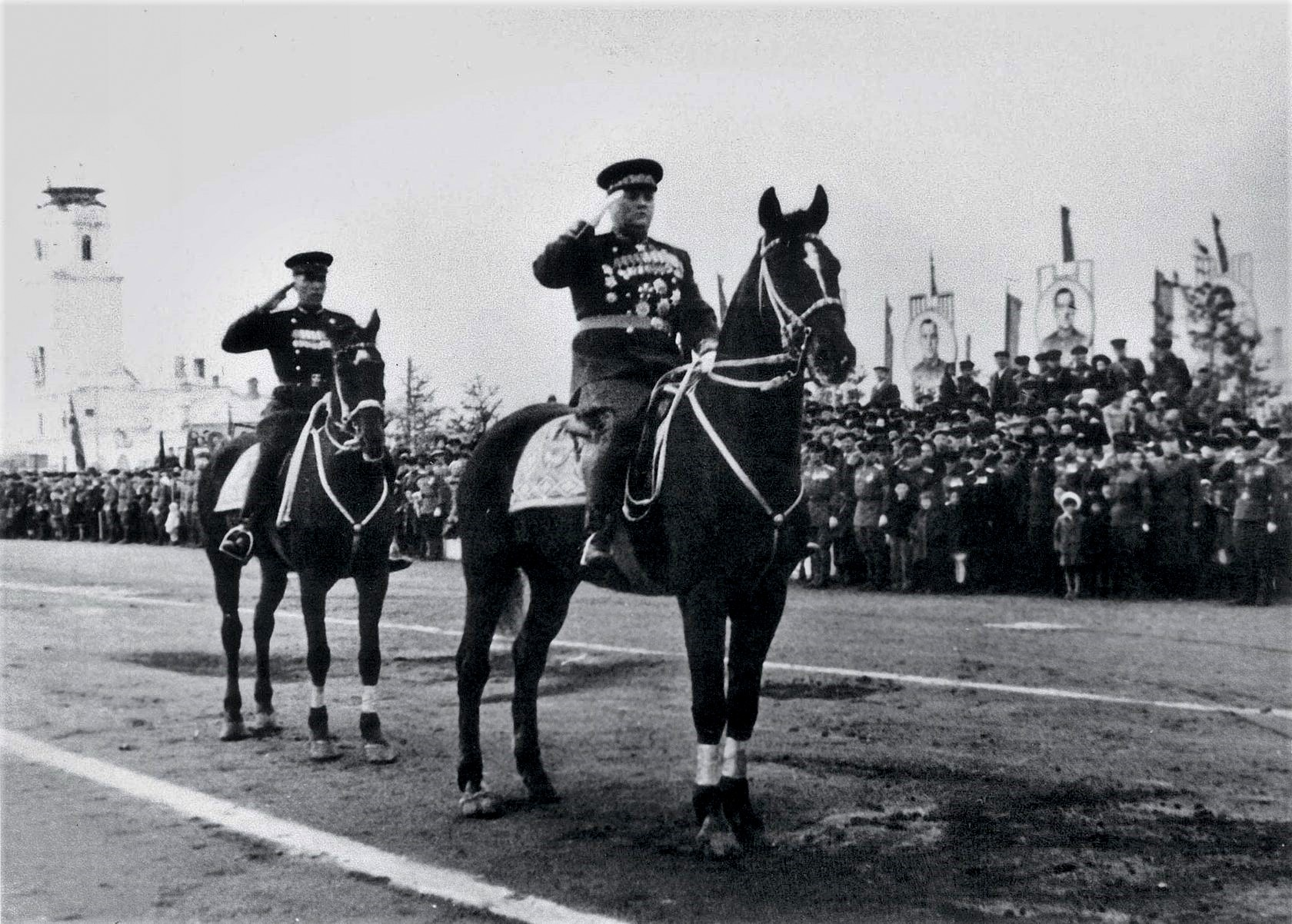 Ворошилов-Уссурийский. Маршал Советского Союза К. А. Мерецков принимает военный парад в честь 29-й годовщины Октябрьской революции. Его сопровождает командир батальона танков ИС-3 218-го тяжелого танкового полка 2-й танковой дивизии майор В. К. Мерецков, сын Маршала